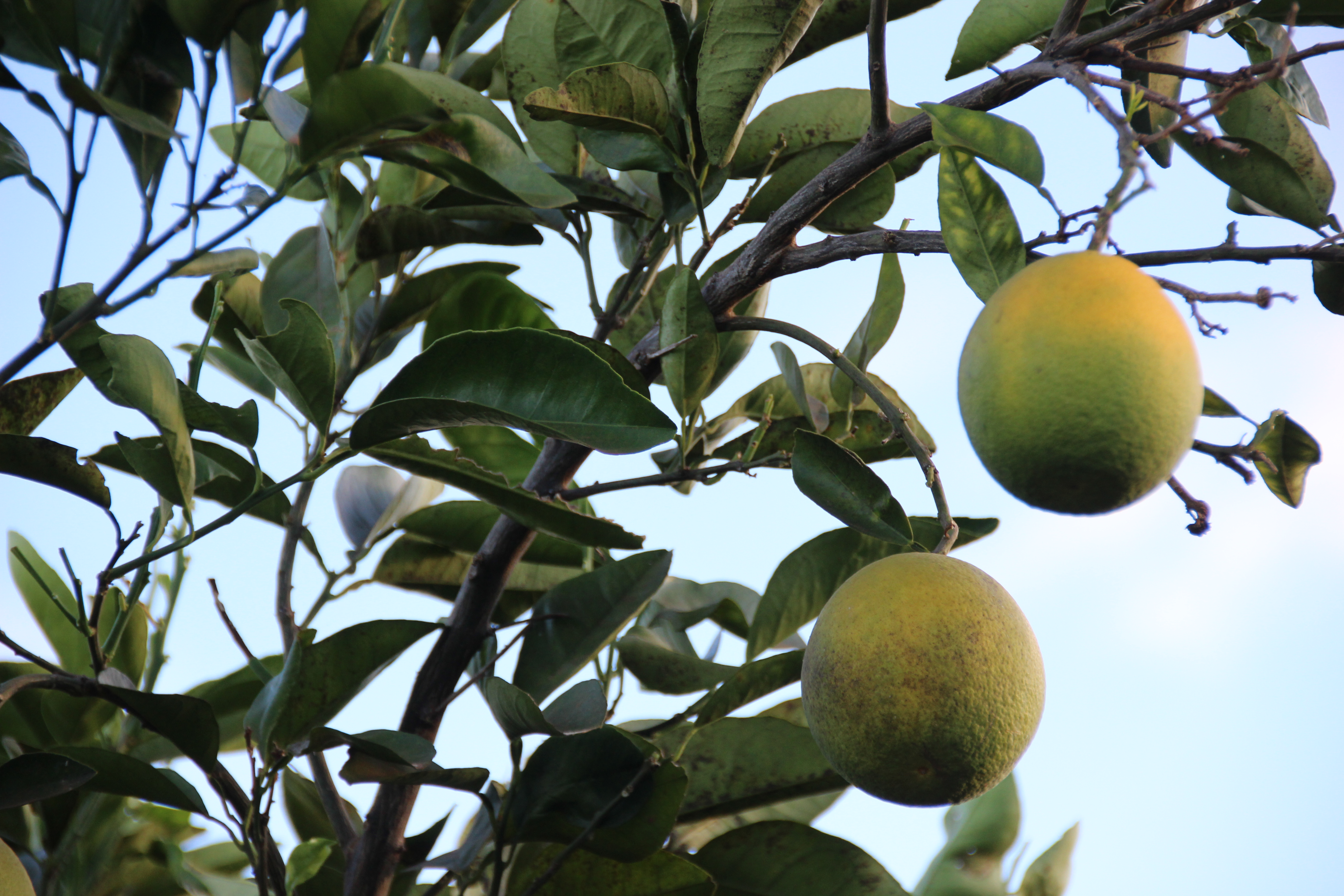 Citricultura em Bom Jesus da Lapa, ano de 2013.